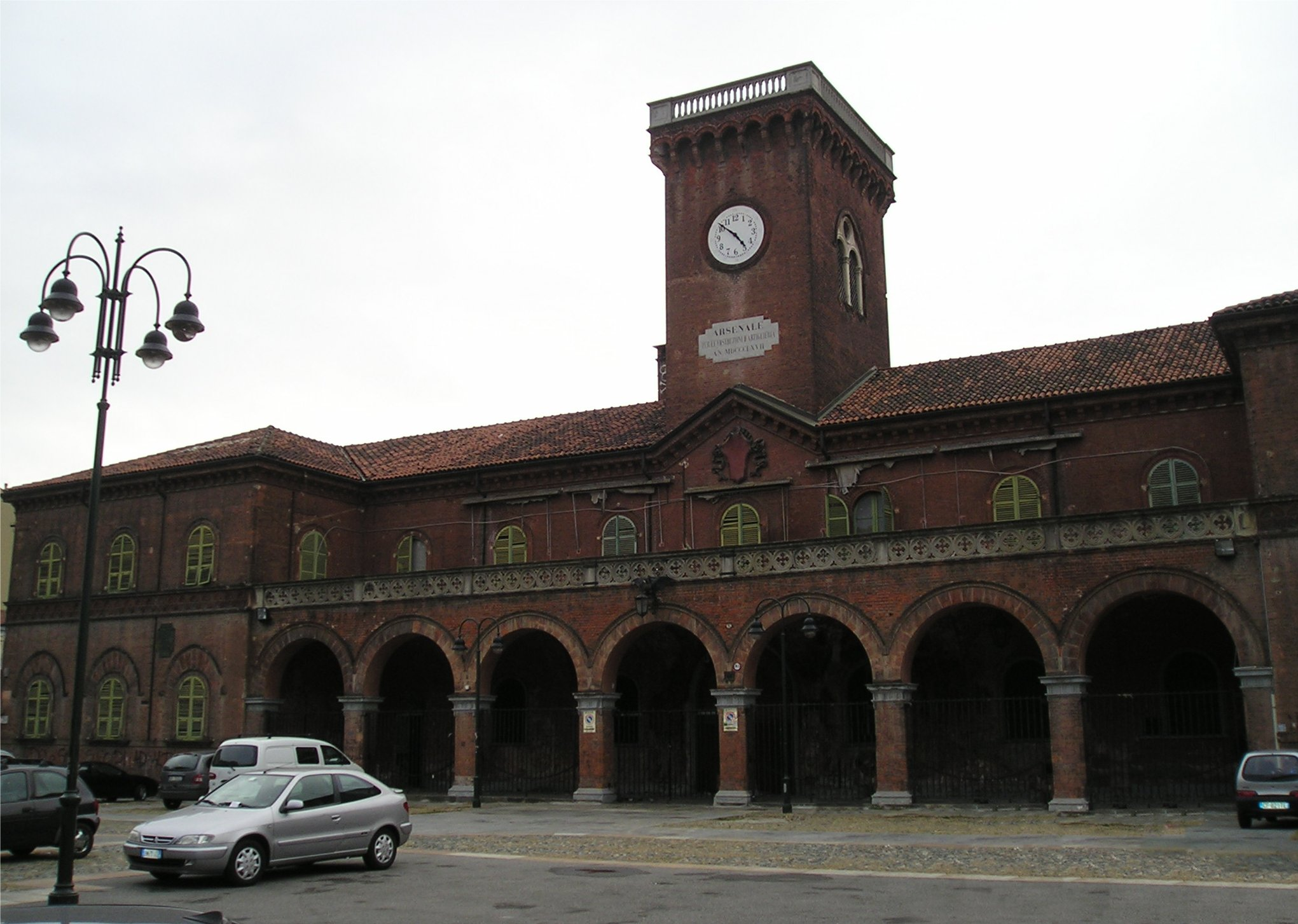 Ex Arsenale Militare, palazzina chiamata Caserma Cavalli, in Piazza Borgo Dora, nuova sede della Scuola Holden, vicino al Sermig.